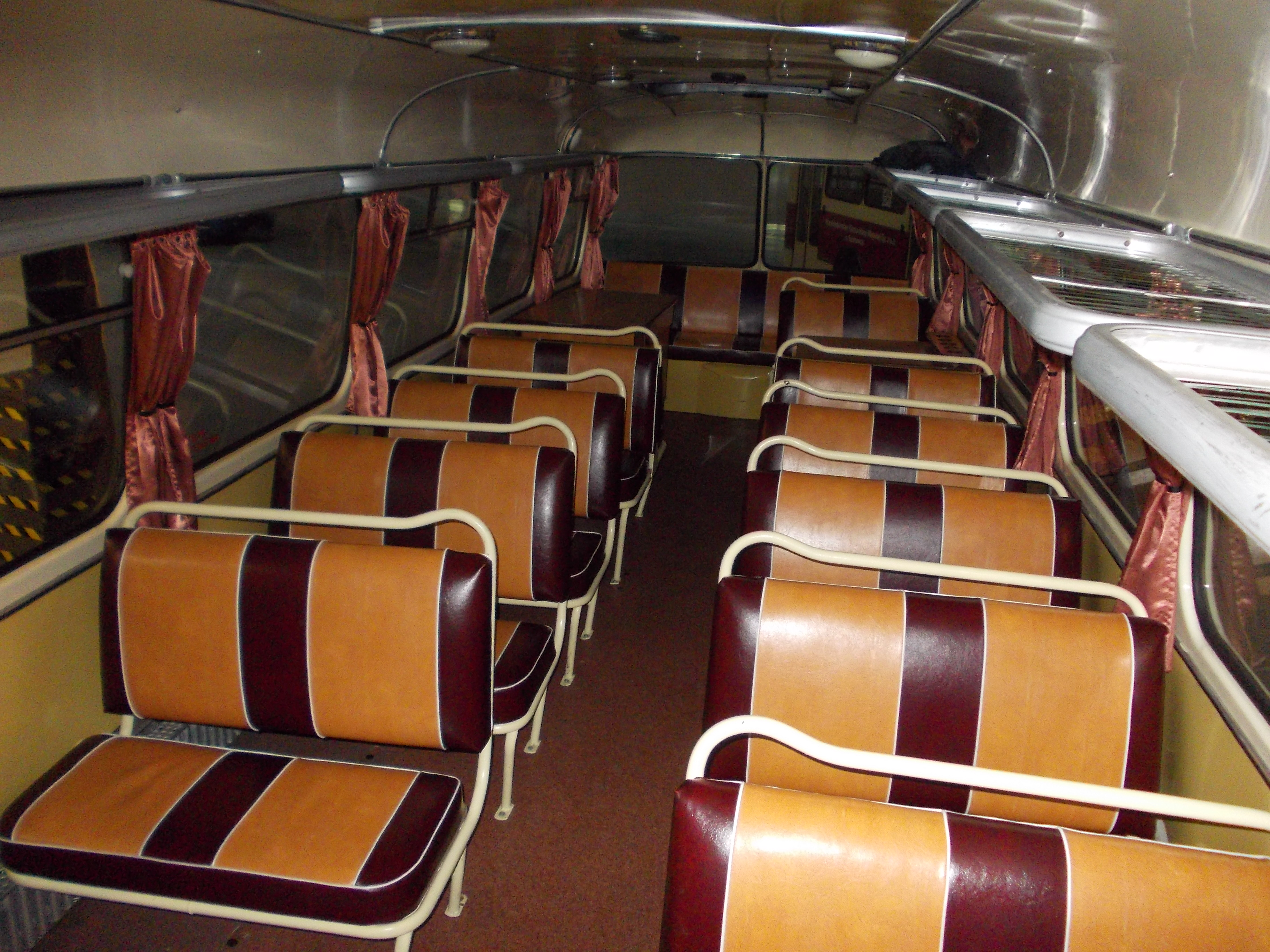 Škoda 706 RTO (rocznik 1970) podczas ekspozycji historycznej towarzyszącej targom SilesiaKOMUNIKACJA 2014 w Sosnowcu.